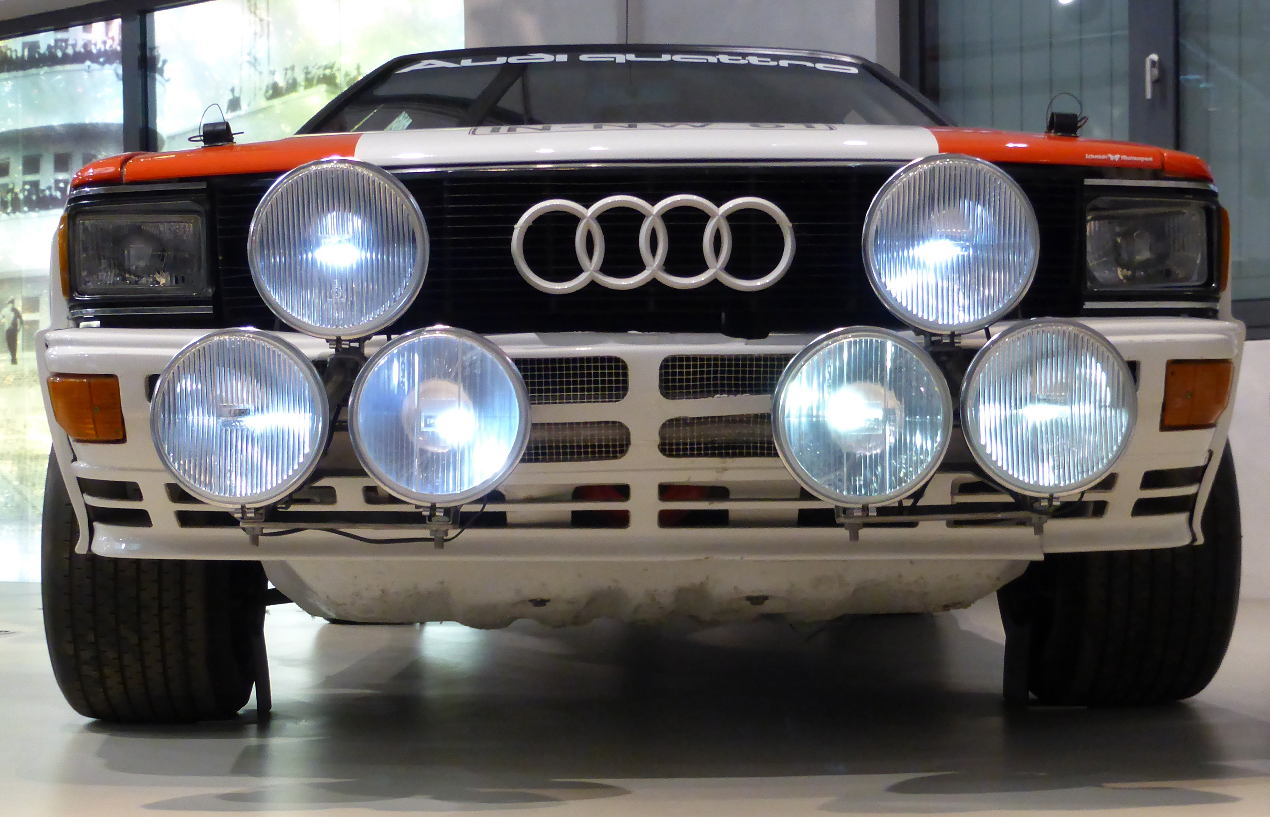 Michèle Mouton, Audi quattro (Rallye-Ausführung, Baujahr 1983) im Deutschen Technikmuseum in Berlin. Wikipedianische KulTour am 10. Oktober 2015 in der Ausstellung des Museums.